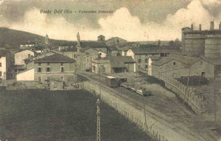 Ponte dell'Olio - Stazione tranviaria